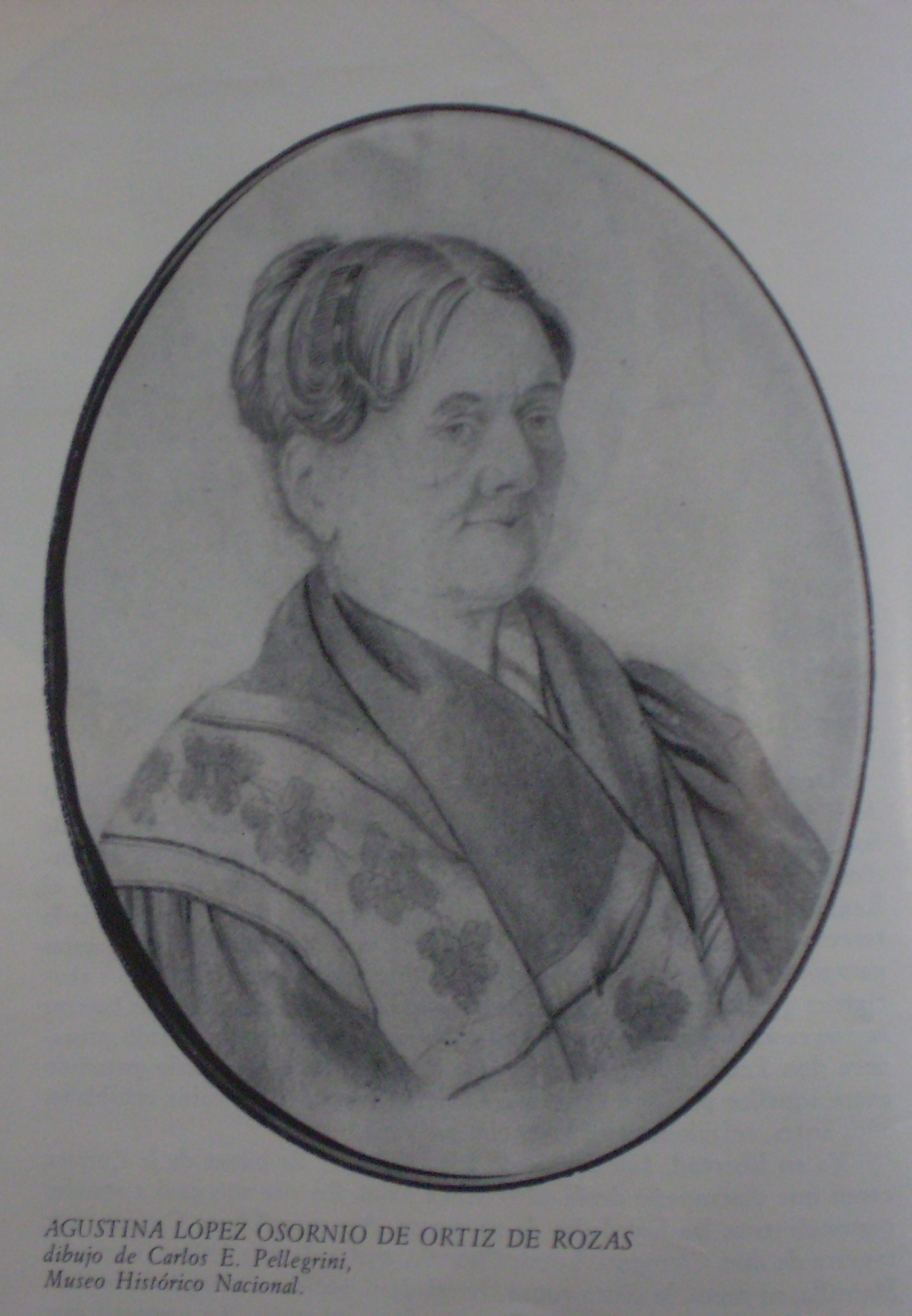 Agustina López Osornio de Ortiz de Rozas. Dibujo de Carlos E. Pellegrini .Original en el Museo Histórico Nacional